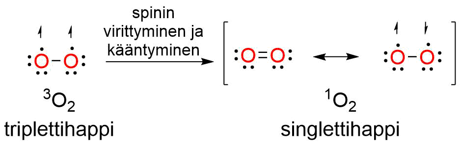 Tripletti- ja singlettihappi